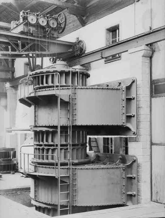 Nr. 138: Elektrizitätswerk Aarau, Etagenturbine